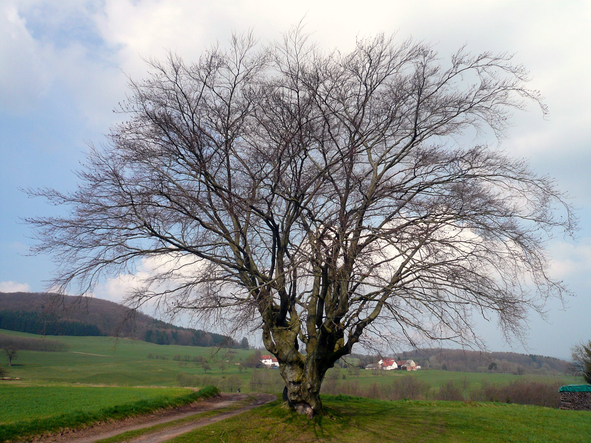 Mehrstammbuche bei Motten